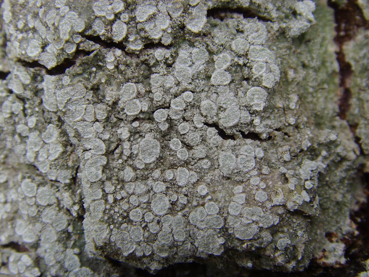 Pertusaria albescens, parc de Maurepas (Rennes, Ille-et-Vilaine, Bretagne, France)